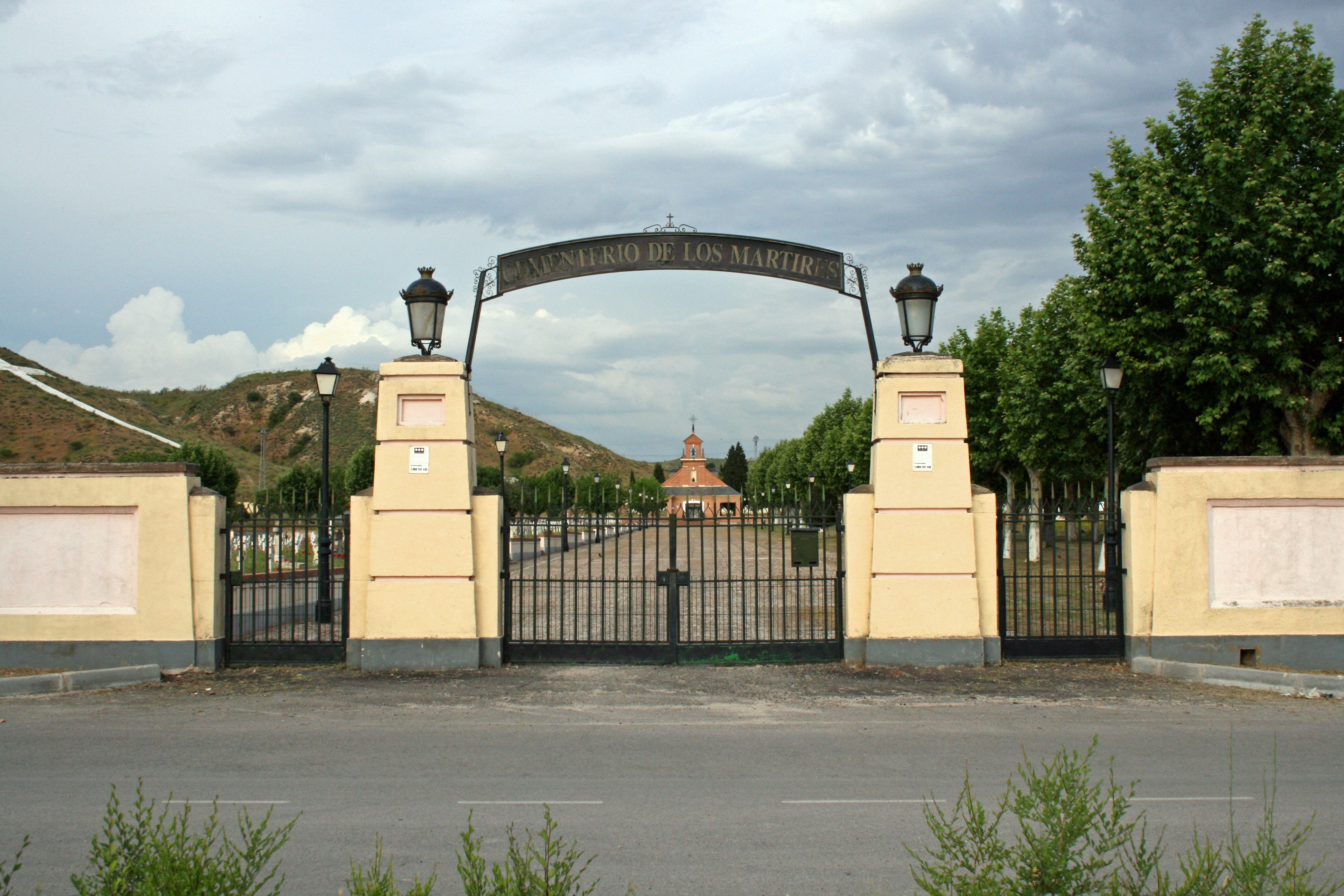 Puerta del cementerio de Paracuellos de Jarama donde se enterraron los asesinados en las matanzas de noviembre-diciembre de 1936